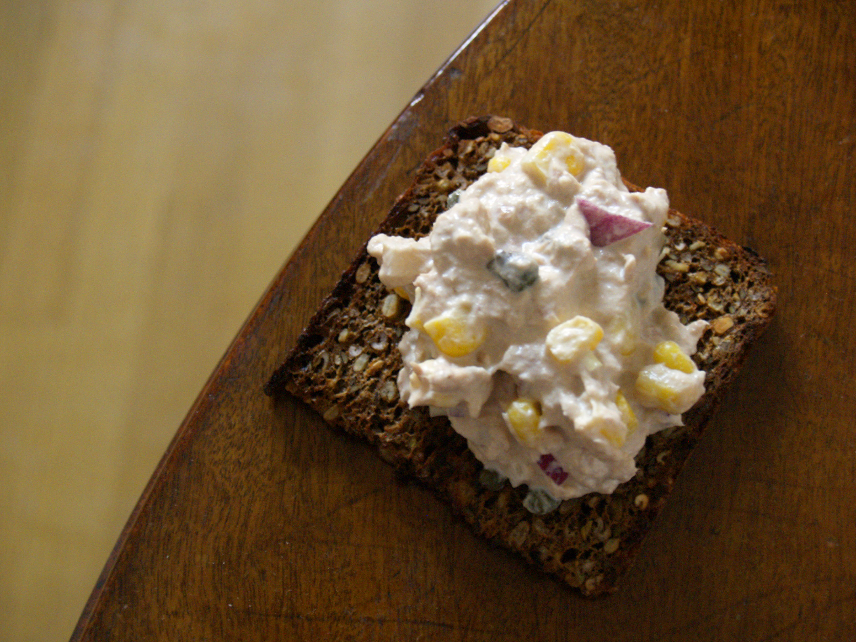 Ristet rugbrød med tunsalat